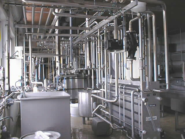 Ruynes-en-Margeride, Cantal, Auvergne, France. Pipe manifold in a cheese plant.